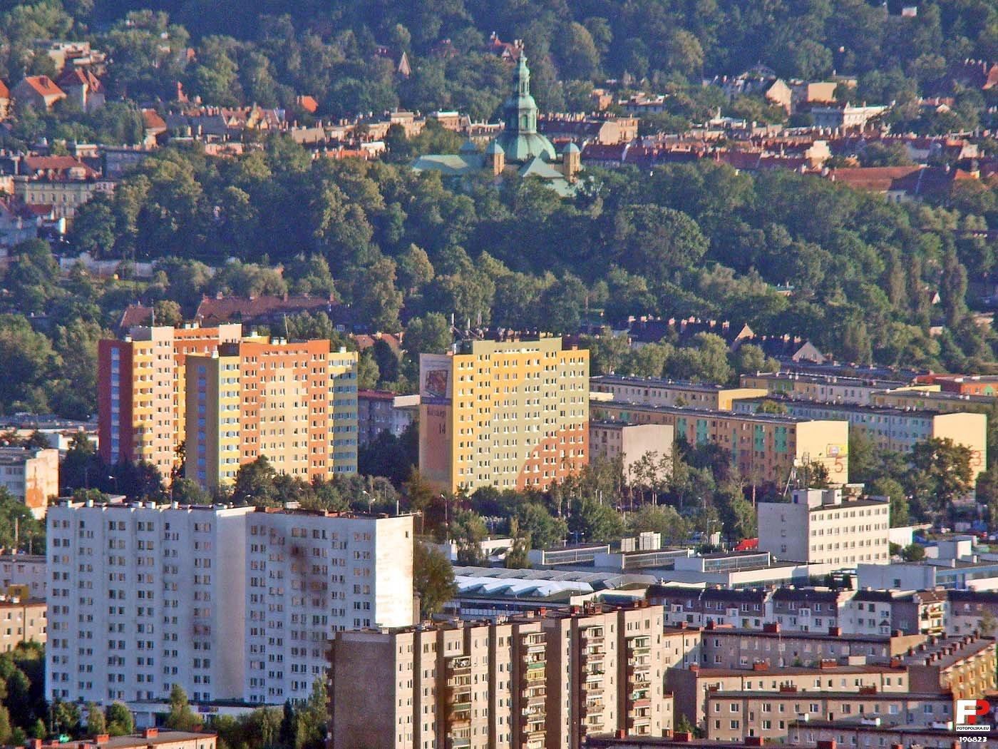 Widok na kościół Garnizonowy przy ul. 1 Maja, a na pierwszym planie te białawe wysokie budynki wykonane w technologii monolitycznej. Ba prawo widoczny zakład to Simet, a trochę dalej trzy kolorowe budynki średniowysokie (do 11 kondygnacji) to budynki z wielkiego bloku przy ul. Różyckiego.